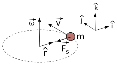 Centripetal Force